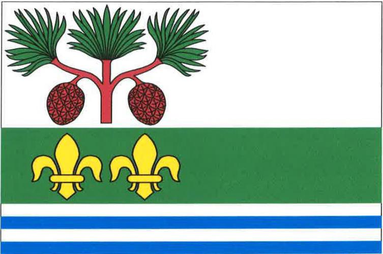 Ludvíkovice vlajka